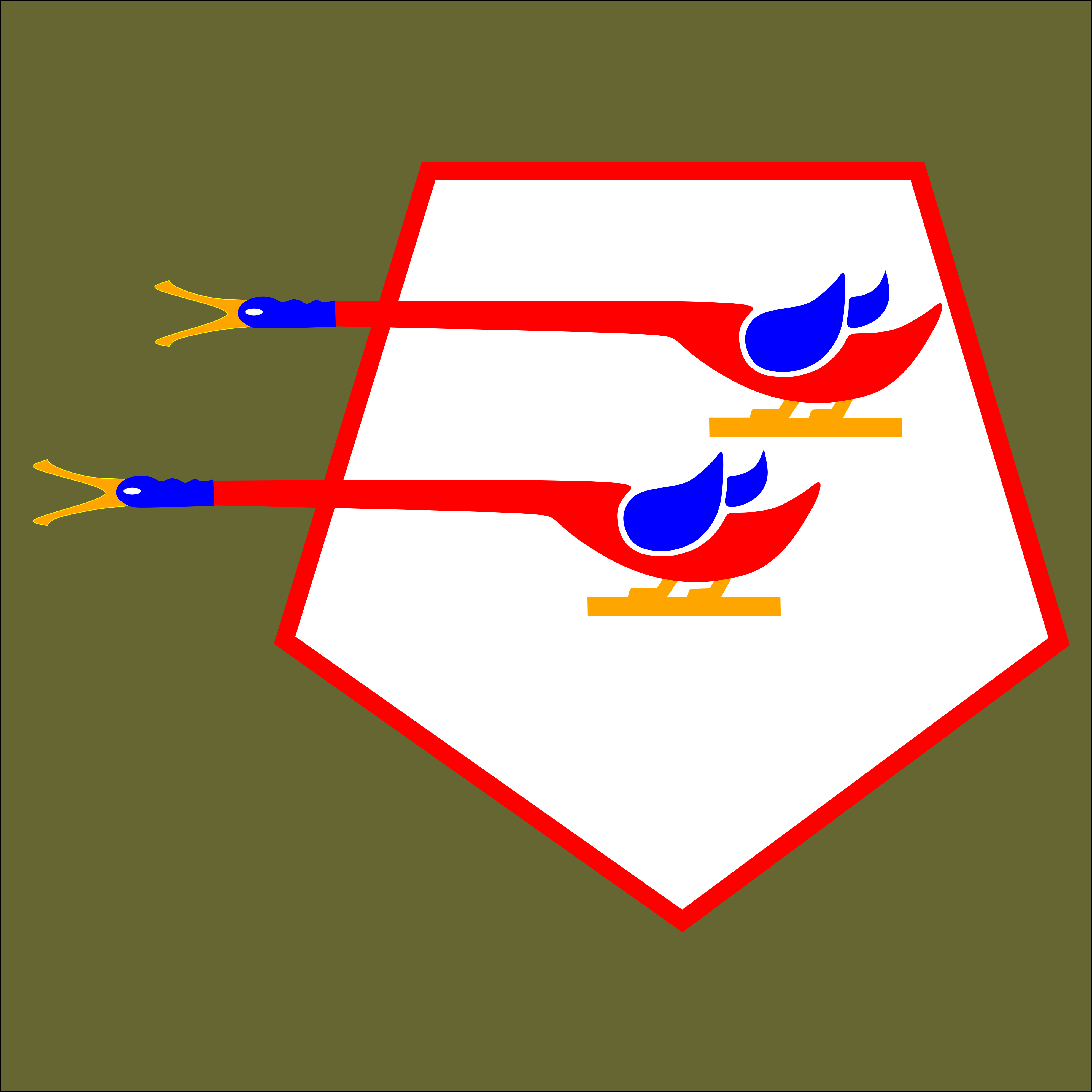 Znak malowany na samolotach 141 eskadry myśliwskiej, stosowany w latach 1927 - 1932